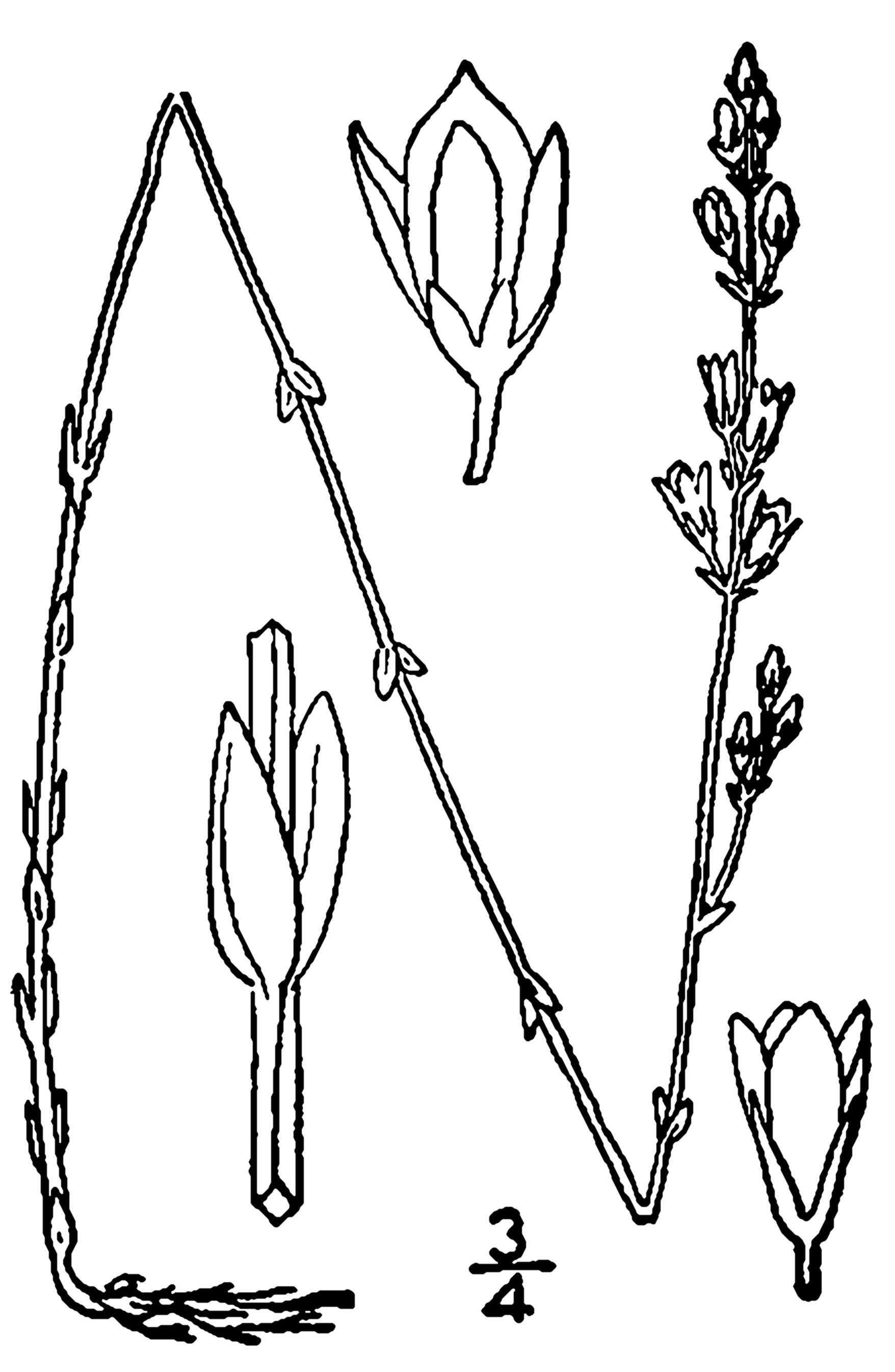 Bartonia virginica